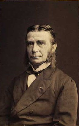 Andreas Schytz Plum Brünniche (1823-1908), Danish physician